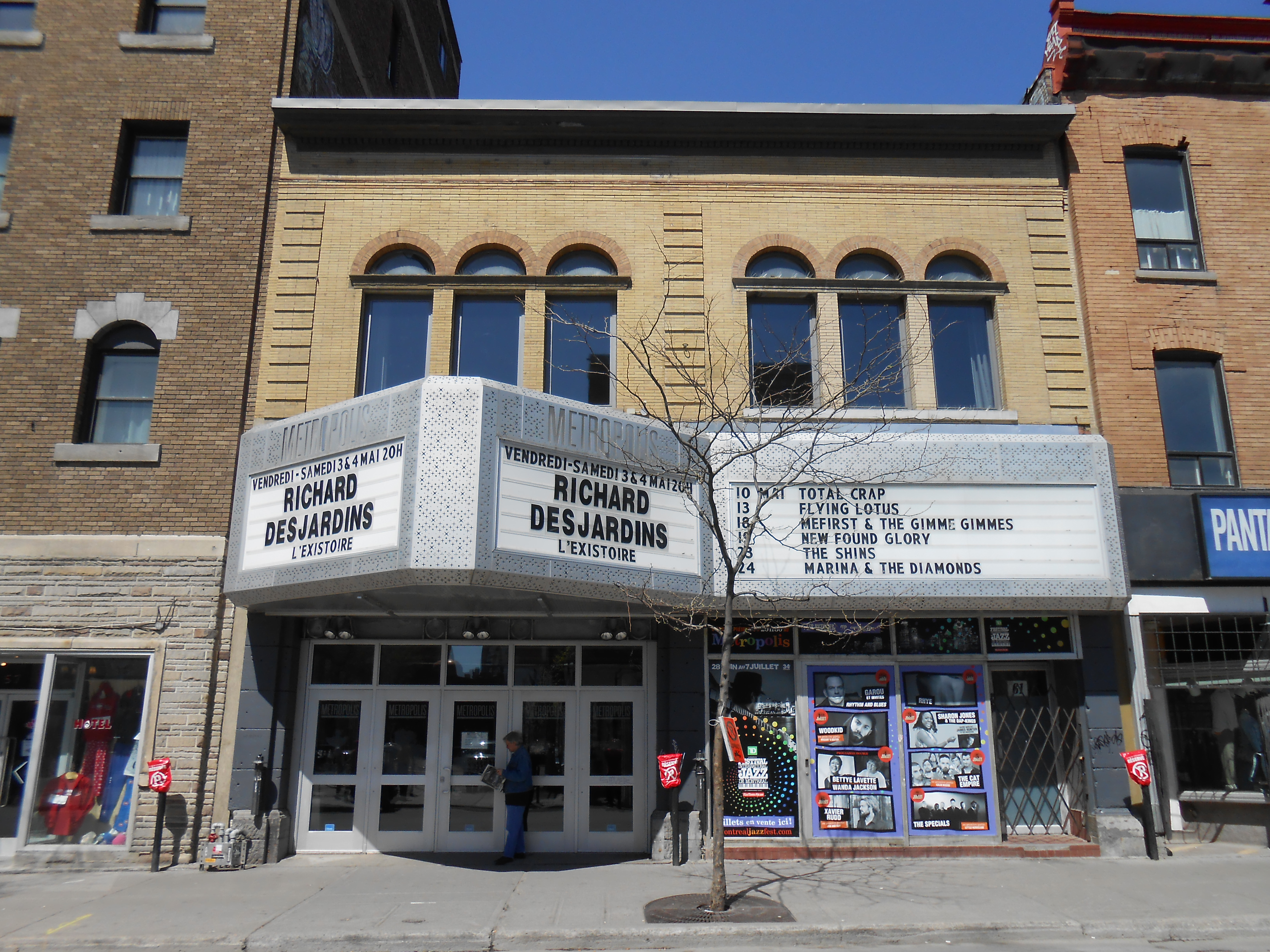 Le Métropolis est une salle de spectacle de Montréal située au 54, rue Sainte-Catherine Est.